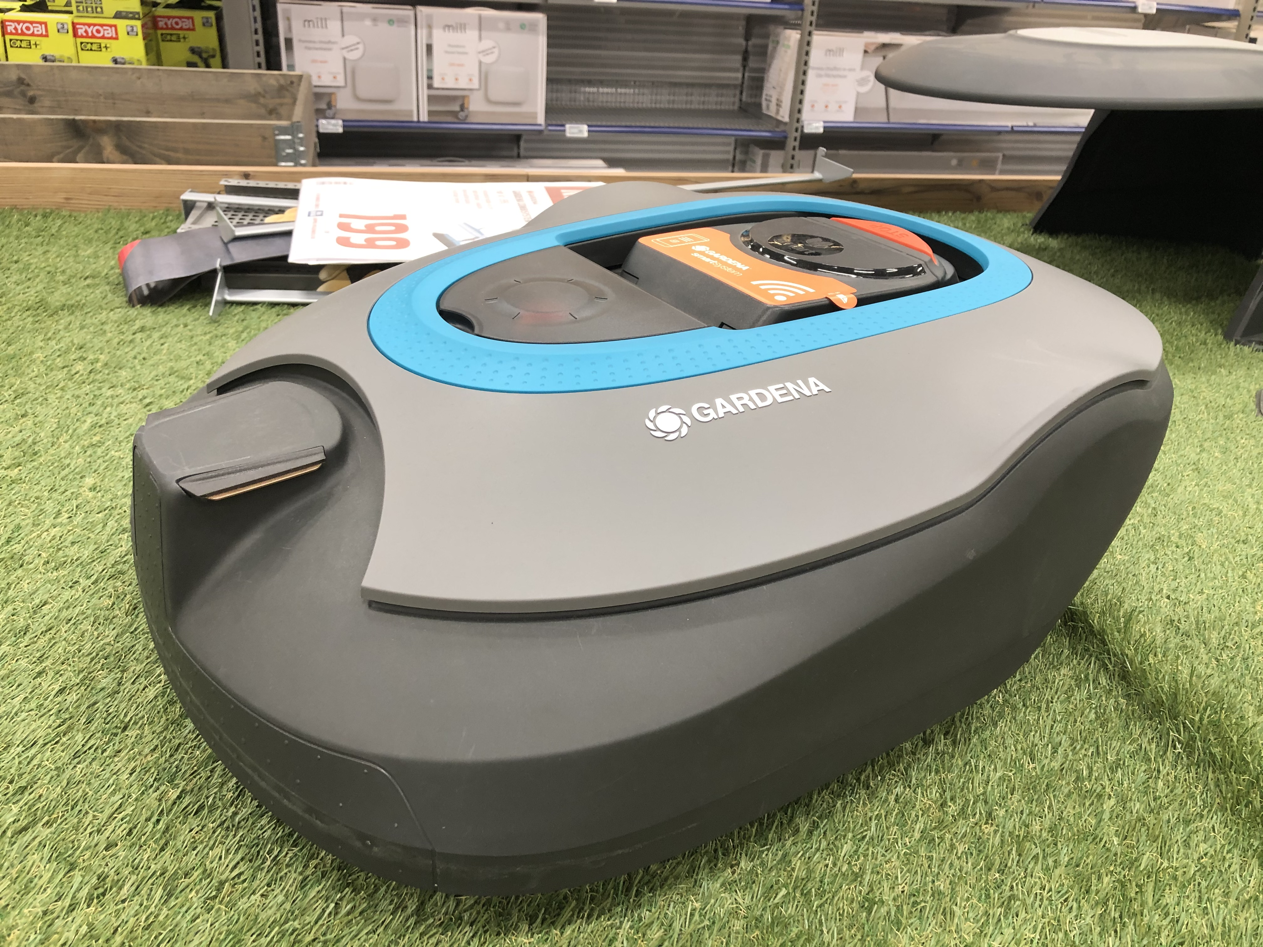 Gardena robotgressklipper.